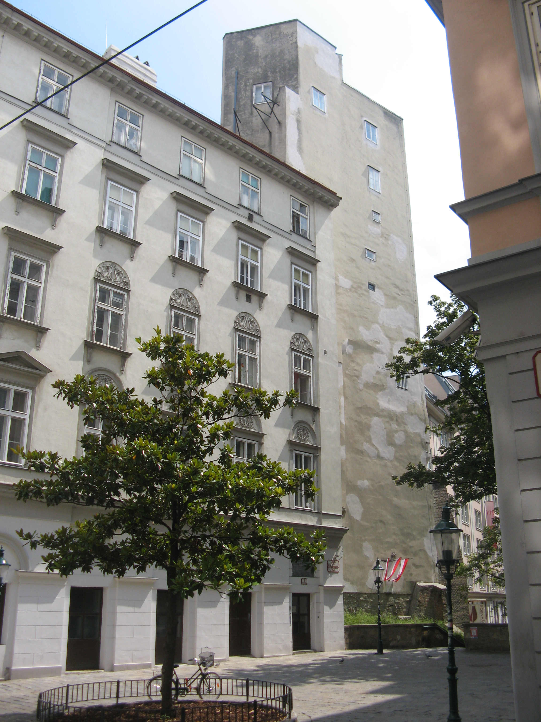 Nr. 1 und Kornhäuslturm, Desider-Friedmann-Platz, Wien-Innere Stadt